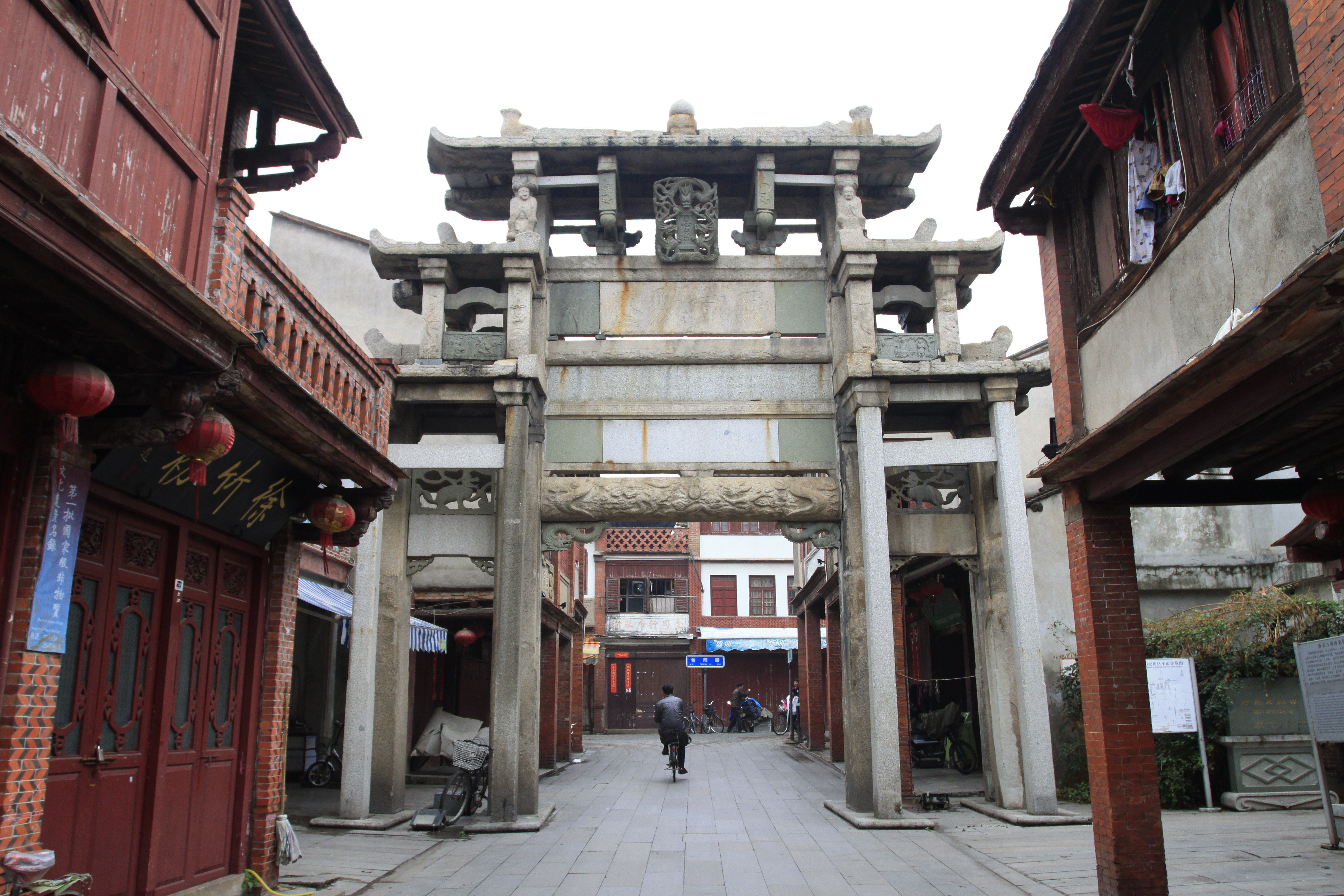 漳州石牌坊，位于中国福建省漳州市，是全国重点文物保护单位。